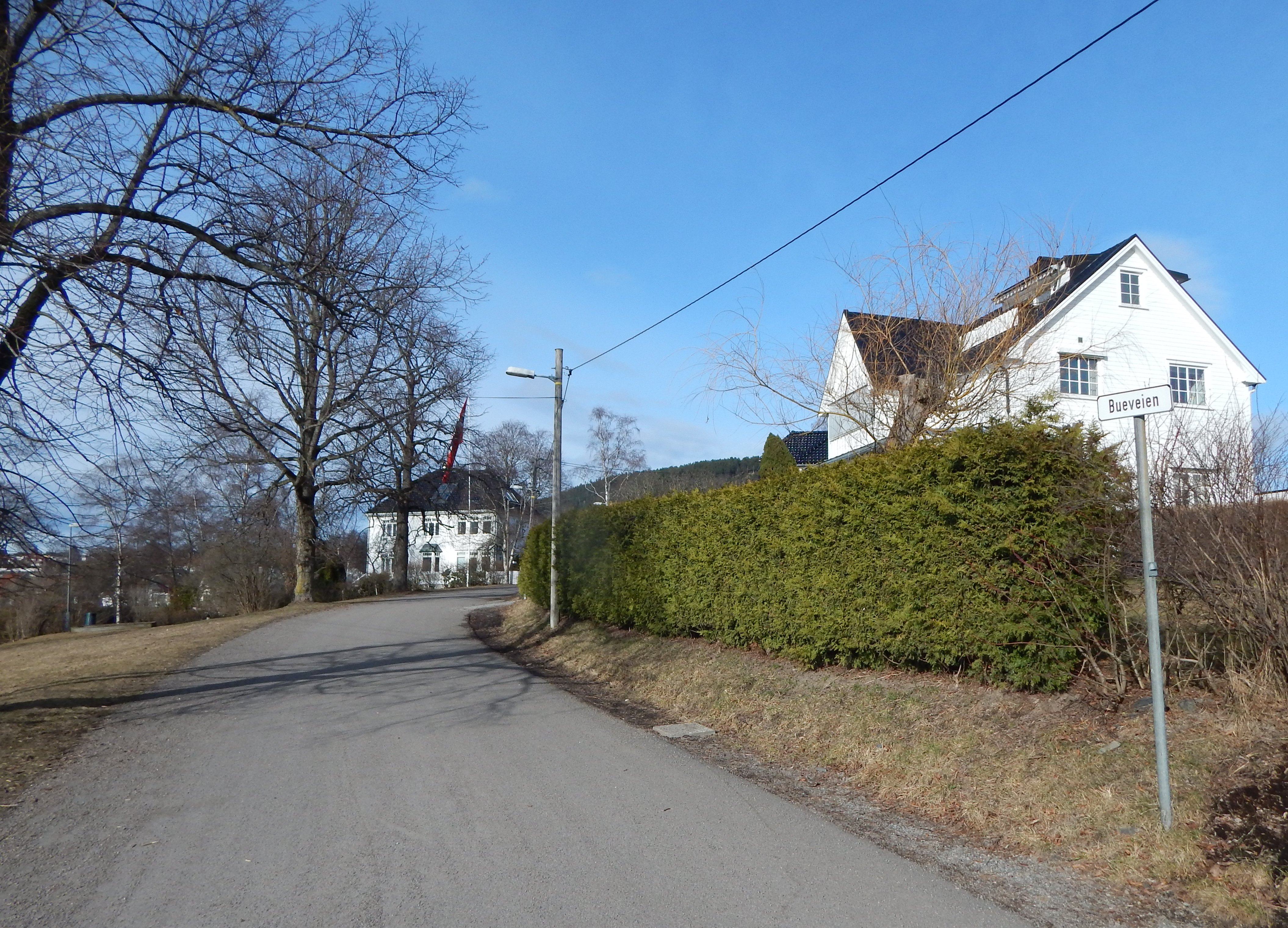 Bueveien